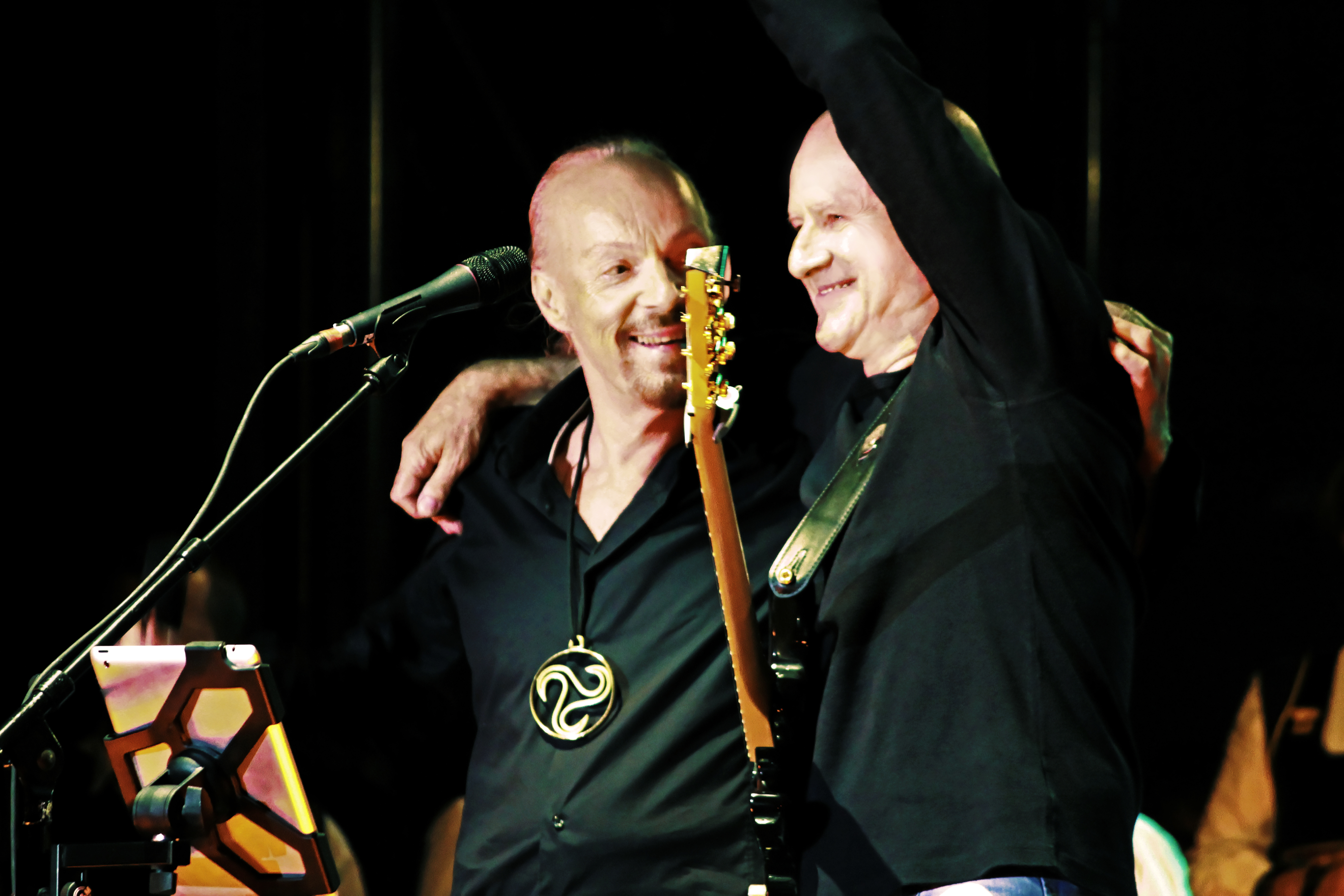 Dan Ar Braz et Alan Stivell lors de son concert inaugural de la tournée liée à la promotion de l'album Celebration, lors du Festival Interceltique de Lorient 2012.